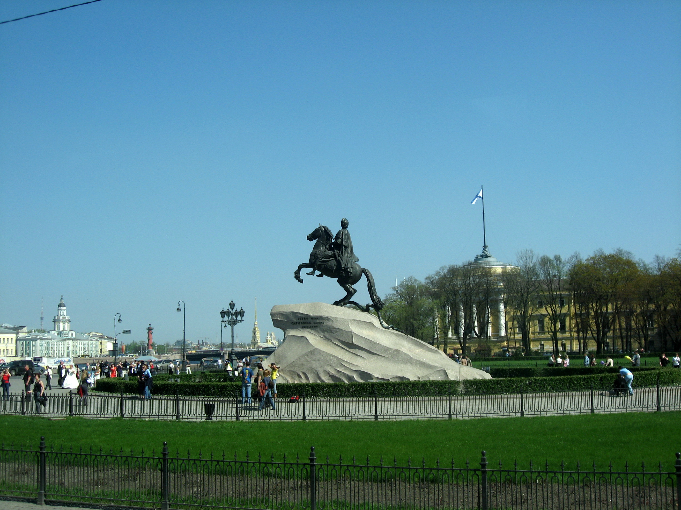 Sankt-Petěrburg (Petrohrad), jezdecká socha Petra Velikého